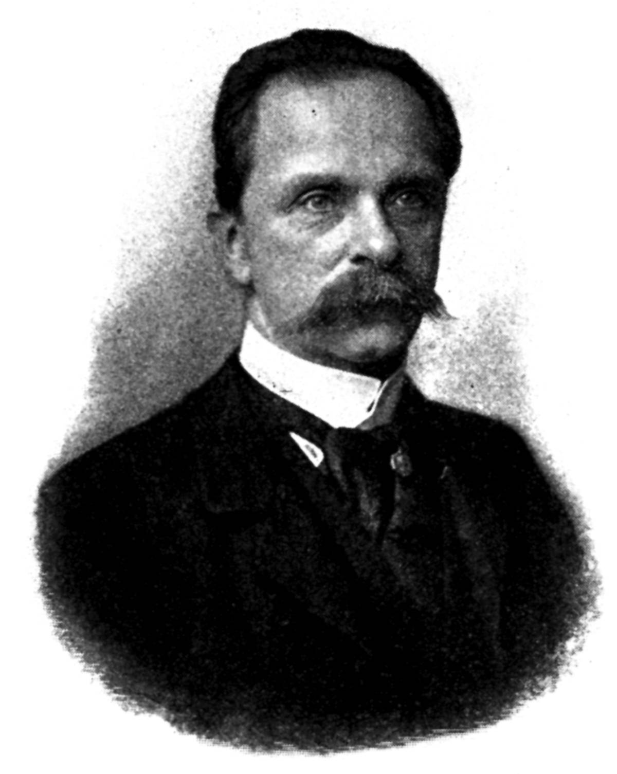 Porträtfoto des Chirurgen Themistocles Gluck